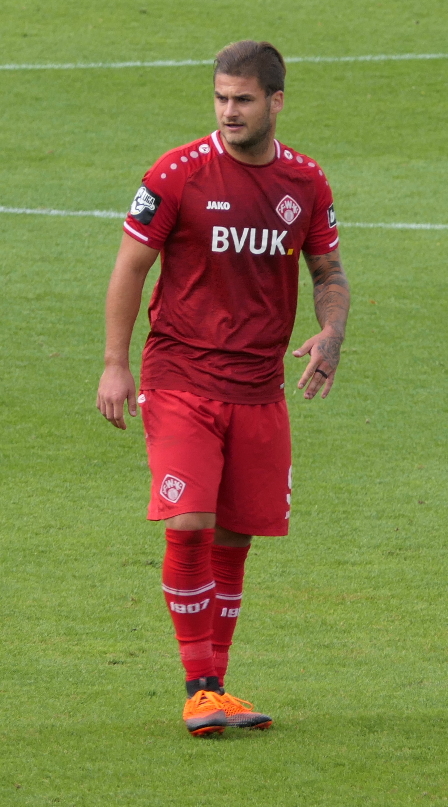 Der Fussballprofi Dominic Baumann im Trikot der Würzburger Kickers beim Heimspiel gegen Eintracht Braunschweig am 22.09.2018.